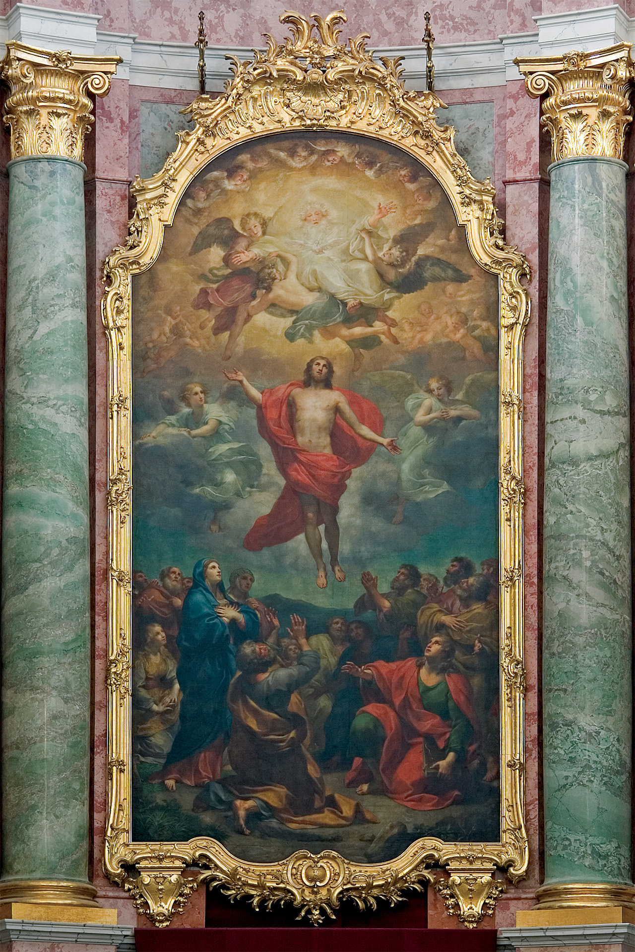 Altargemälde in der Hofkirche Dresden. Originalmaße: Ca. 4,50 x 9,30 Meter.